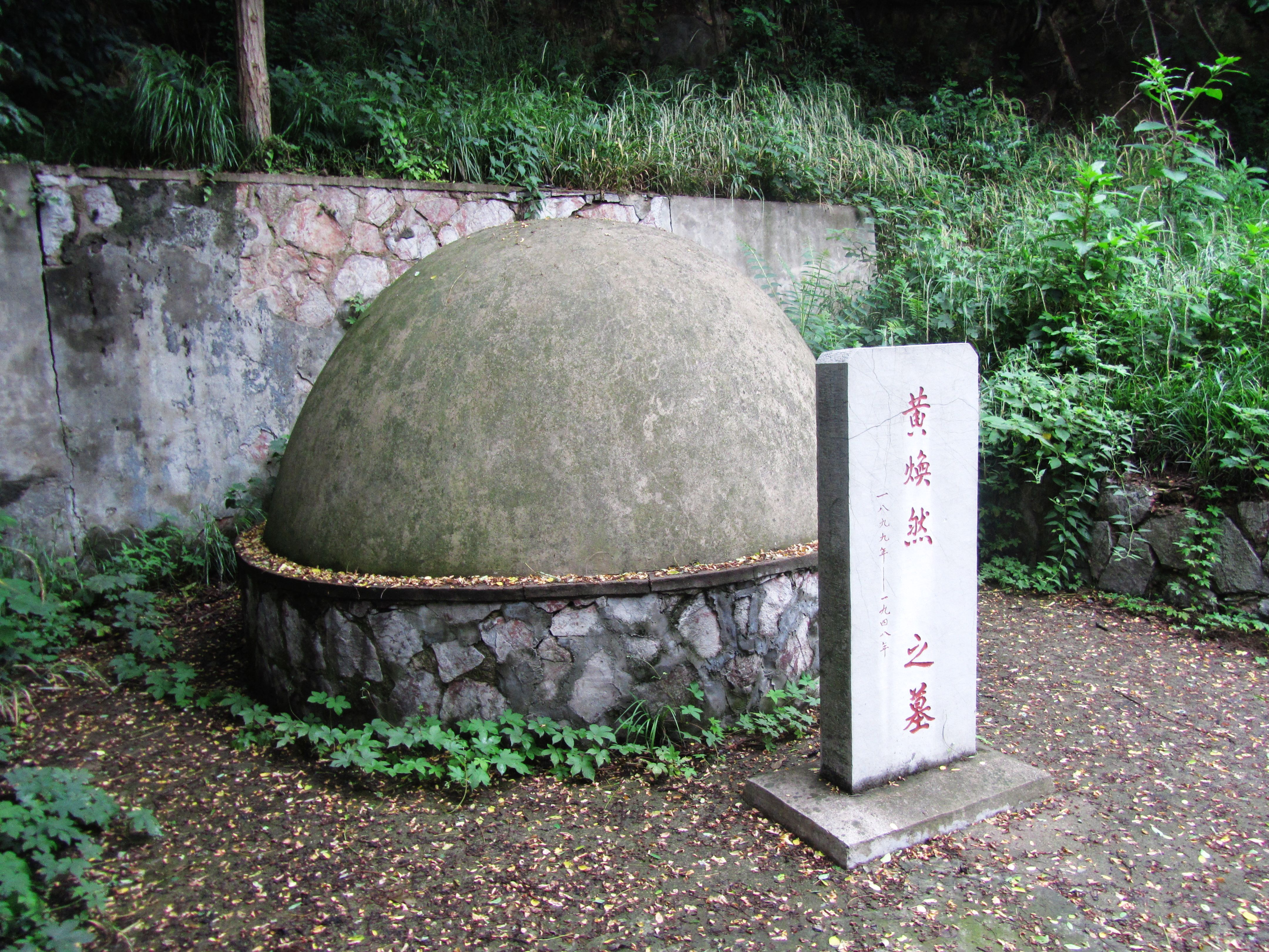 黄百韬墓，近观。